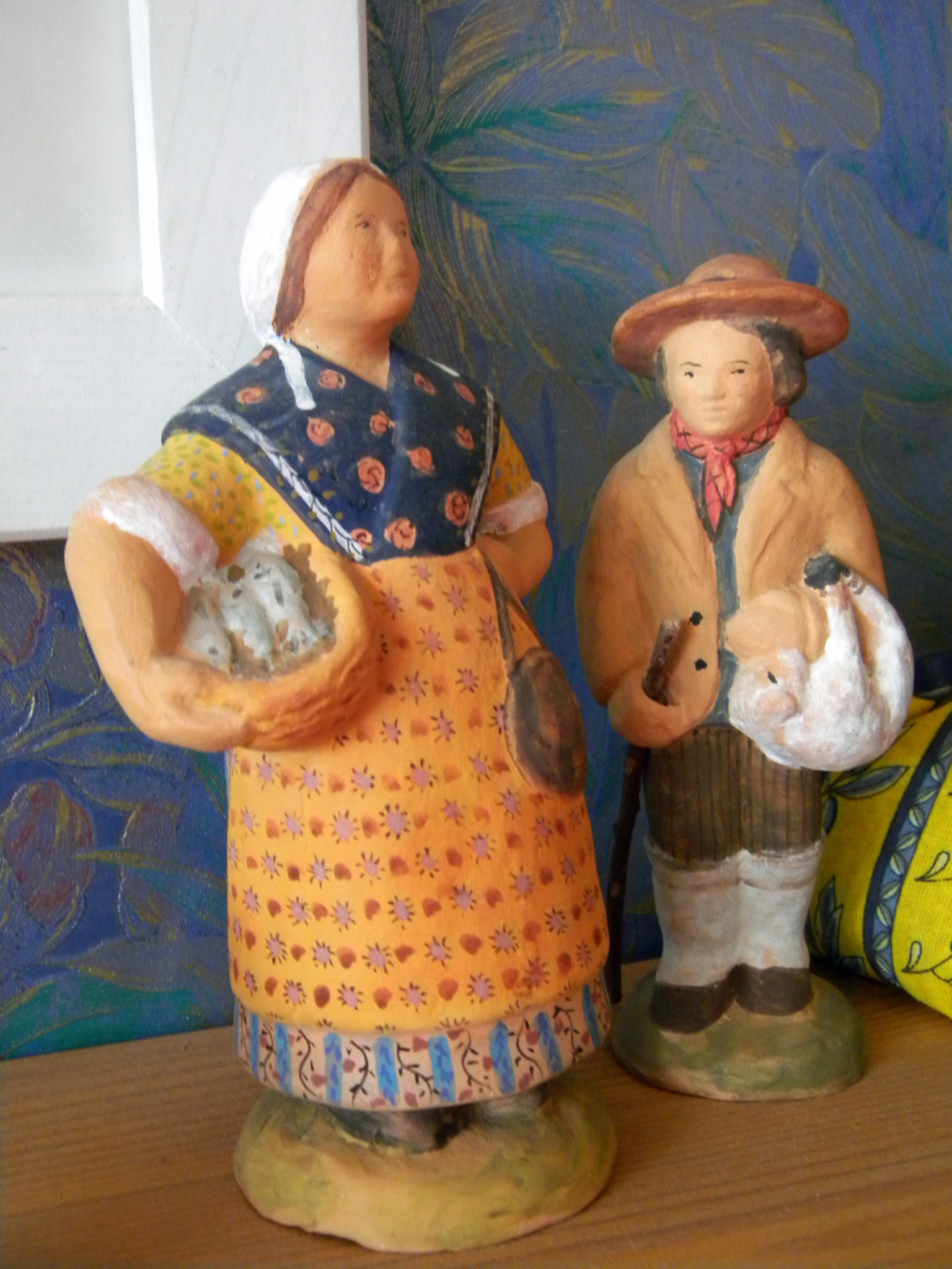 Santons de Provence, Pistachié, le valet de ferme et son épouse Honorine, la poissonière